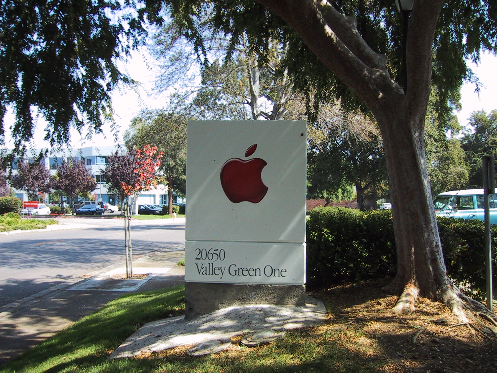 2000年9月撮影。アップル社キャンパス内ロゴ表示道案内標識